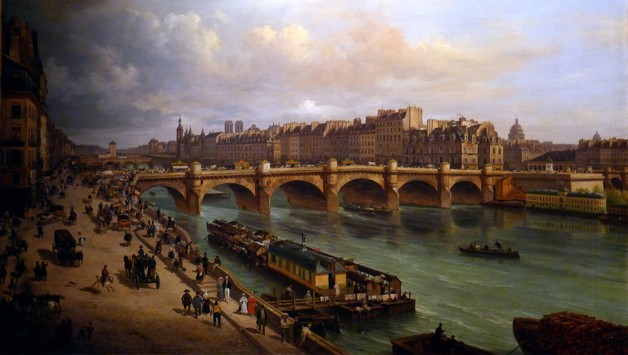 Ce tableau présente un intérêt historique et iconographique relatif au Paris de 1832. On voit encore sur le Pont-Neuf les petites boutiques en hémicycle bâties par Soufflot en 1775 ; elles disparaitront sous le Second Empire. Sur le quai de l’Horloge, avant la Conciergerie, on remarque des immeubles qui seront absorbés par les agrandissements du Palais de Justice. Les « Bains du Pont-Neuf » occupent la pointe de l’ile.